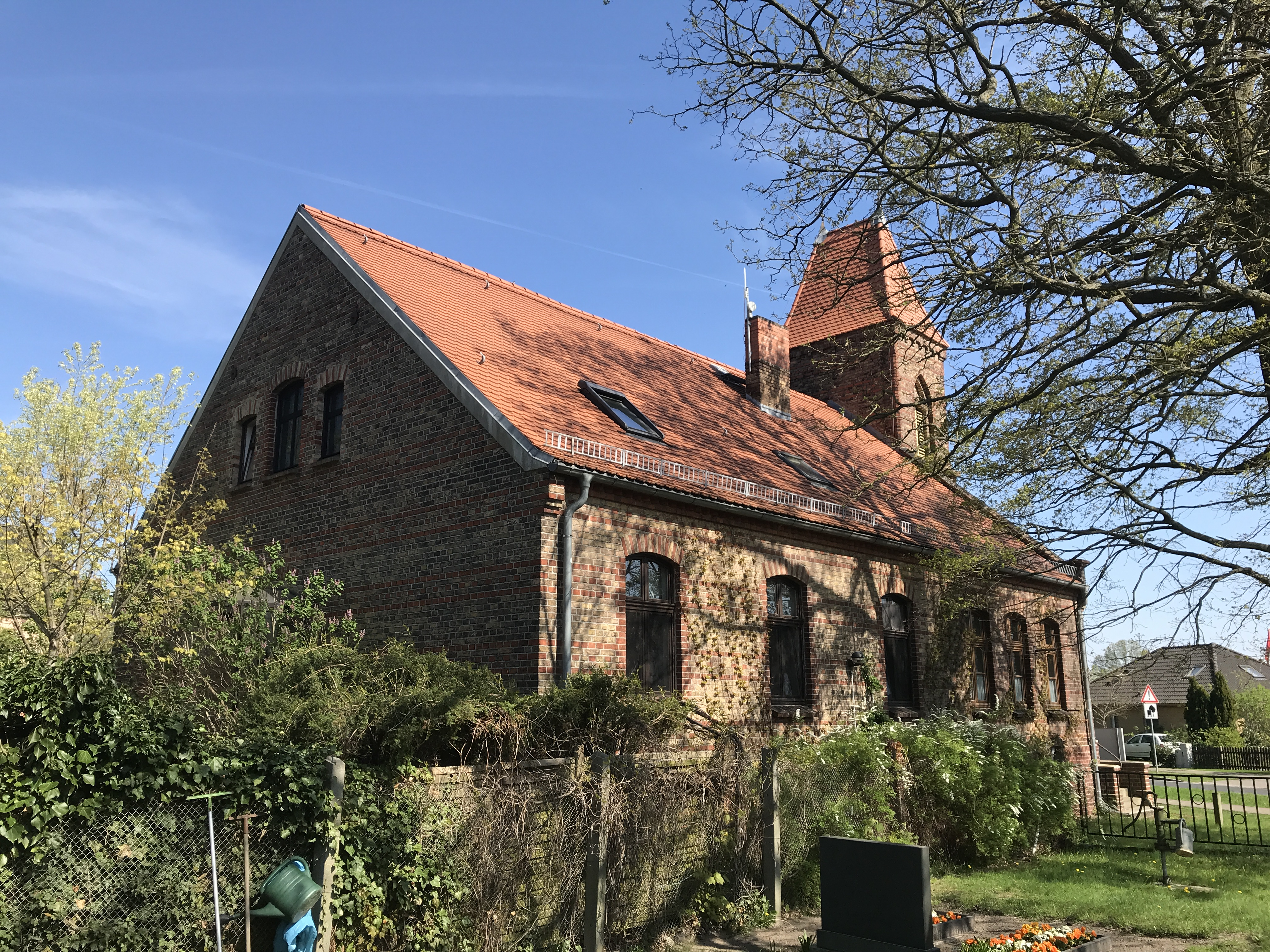 Dorfkirche Fahlhorst, Landkreis Potsdam-Mittelmark in Brandenburg